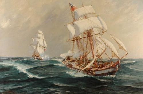 Goleta Peruviana - Guerra contra la Confederación Perú-Boliviana 1838